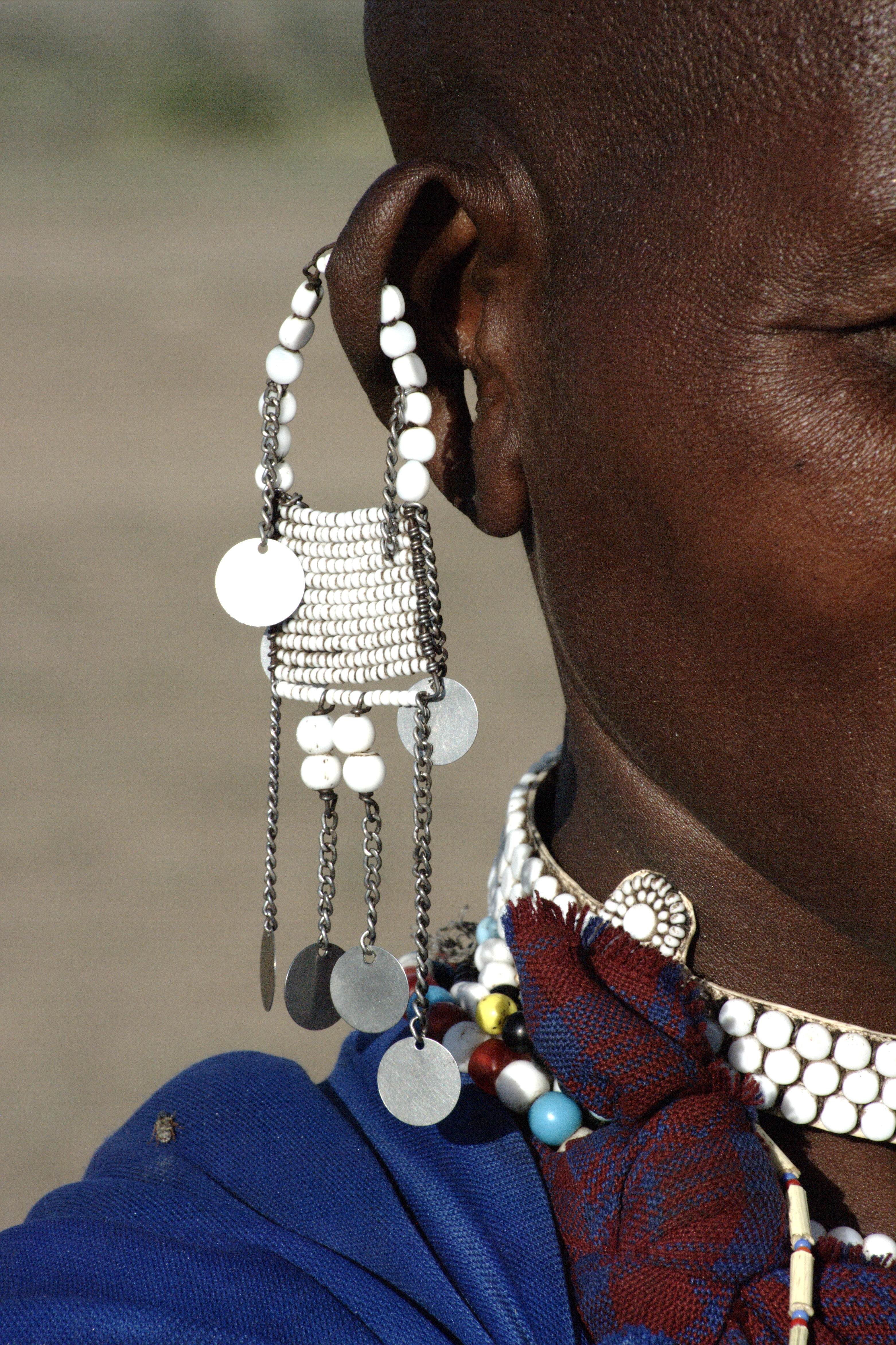 Parure d'oreille d'une femme Masaï, en Tanzanie.